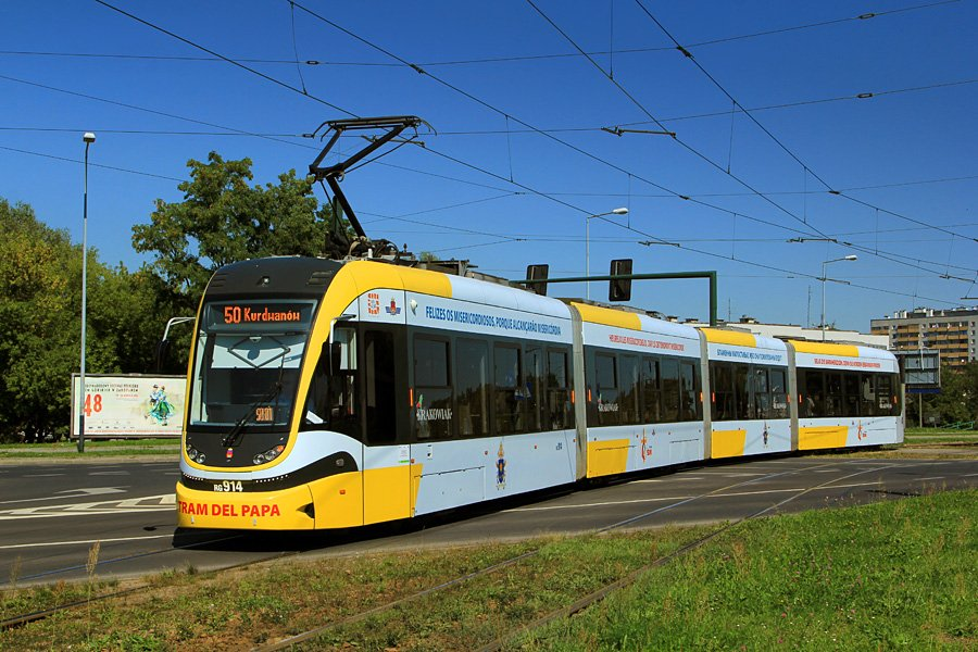 Tramwaj Pesa Krakowiak o numerze RG914, którym podczas Światowych Dni Młodzieży podróżował papież Franciszek (Tram del Papa), na linii nr 50 w Krakowie.